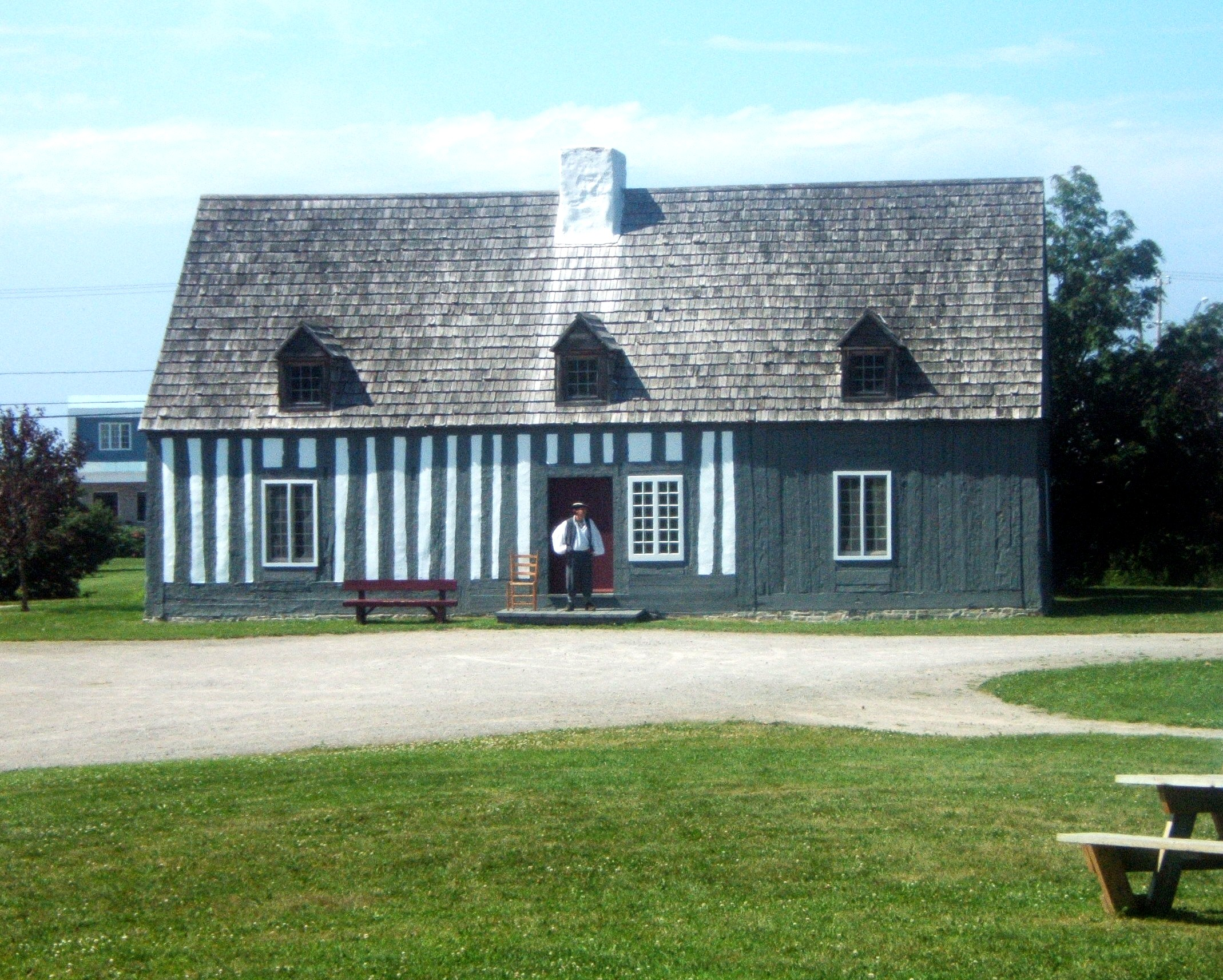 Maison Lamontagne de Rimouski. Construite en 1750 par Marie-Agnès Lepage, petite-fille du Seigneur-fondateur de la ville René Lepage, elle porte aujourd'hui le nom de la famille qui y résida en 1844. Elle est une des plus vieilles maisons de colombage pierroté au Québec. Photo prise par JF Lepage à l'été 2006.